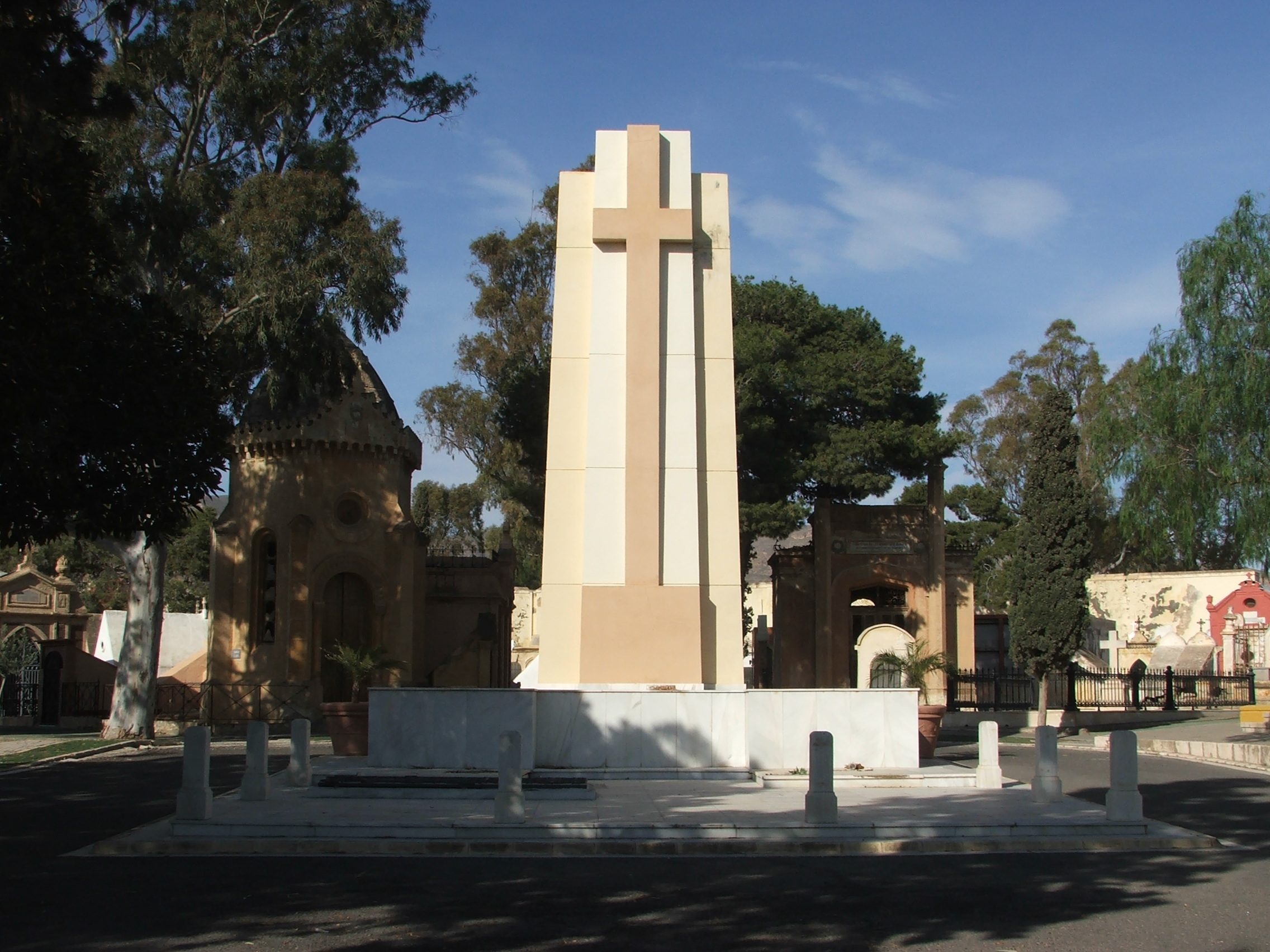 Cruz de los Caídos, cementerio de San José en Almería, Andalucía, España.